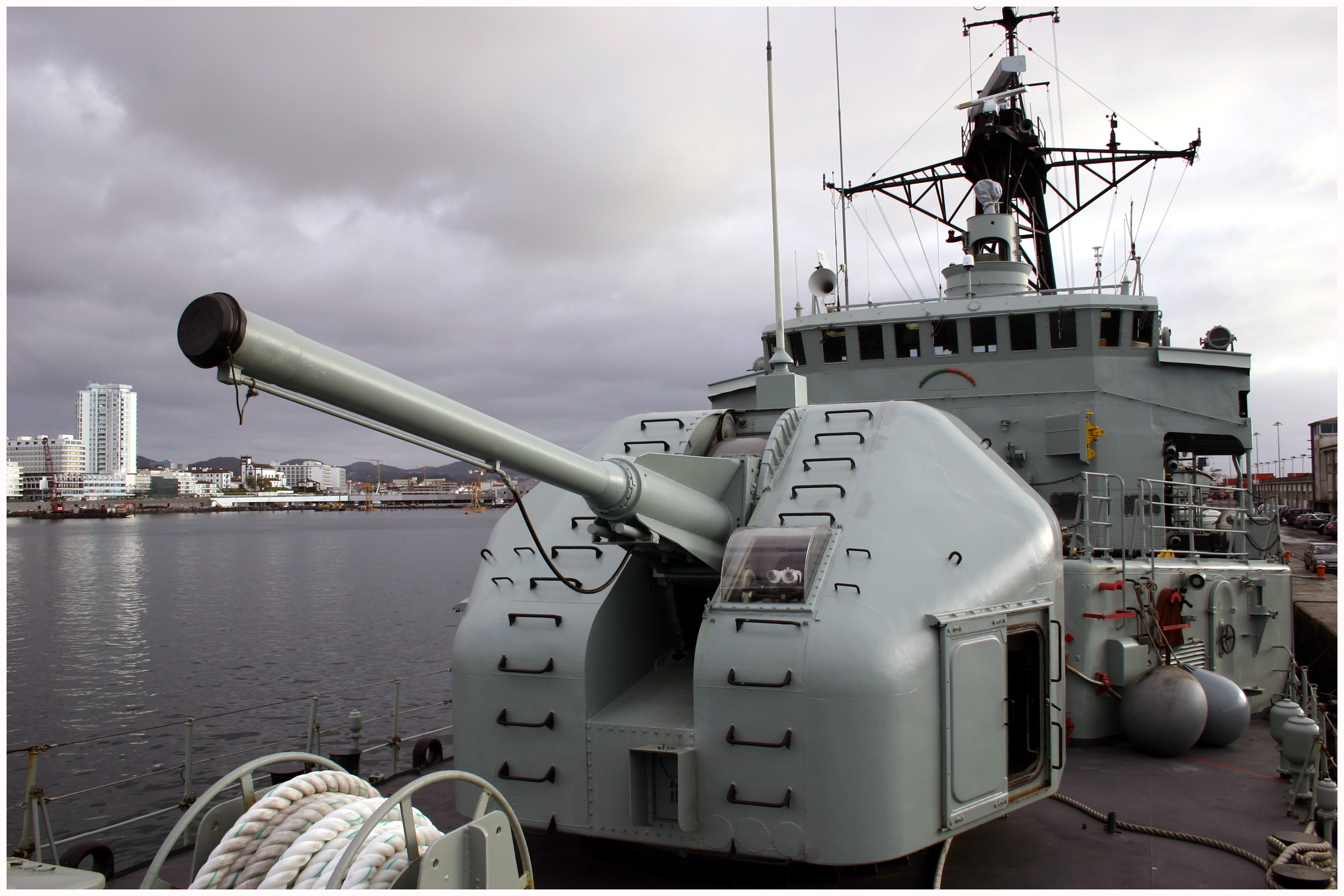 Corveta Afonso Cerqueira